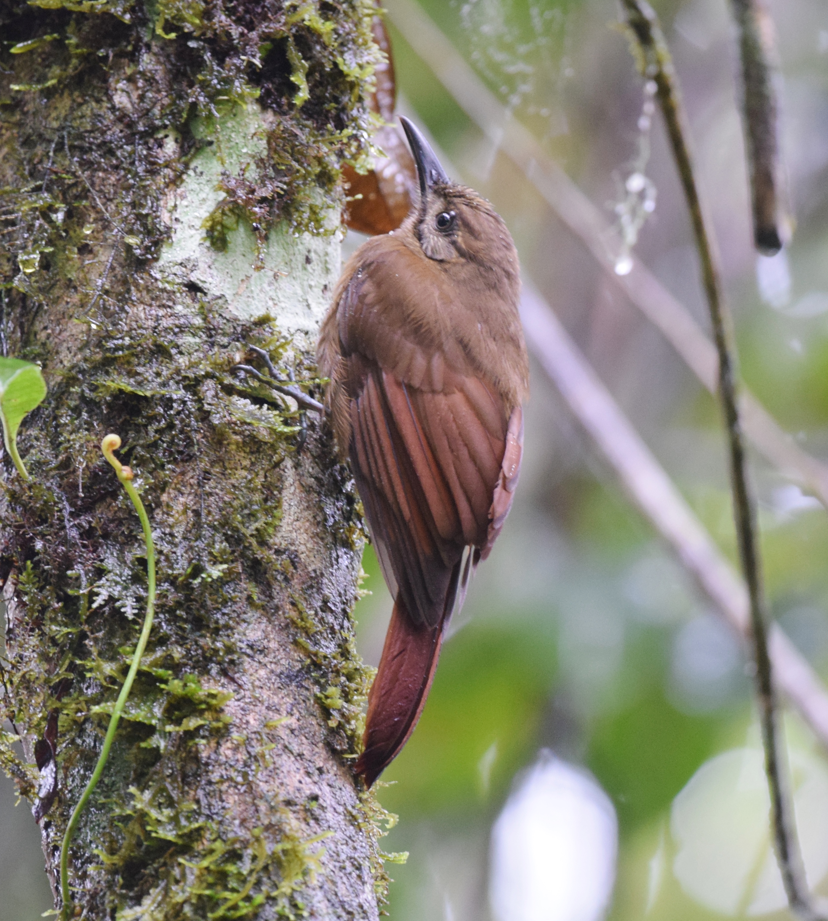 Costa Rica - 2/11/16 CATIE, Casa Turire and Laguna Angostura